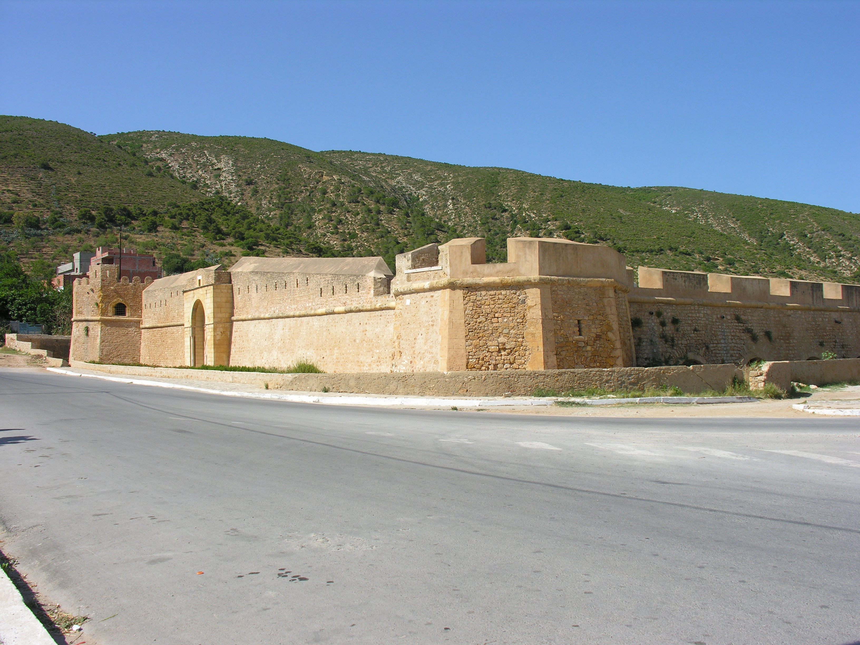 Borj El Loutani (en bas du village) près du vieux port.